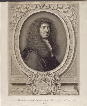 Gabriel-Nicolas de La Reynie (1625-1709), lieutenant général de police, conseiller d'État. Gravure d'après un portrait peint par Pierre Mignard.